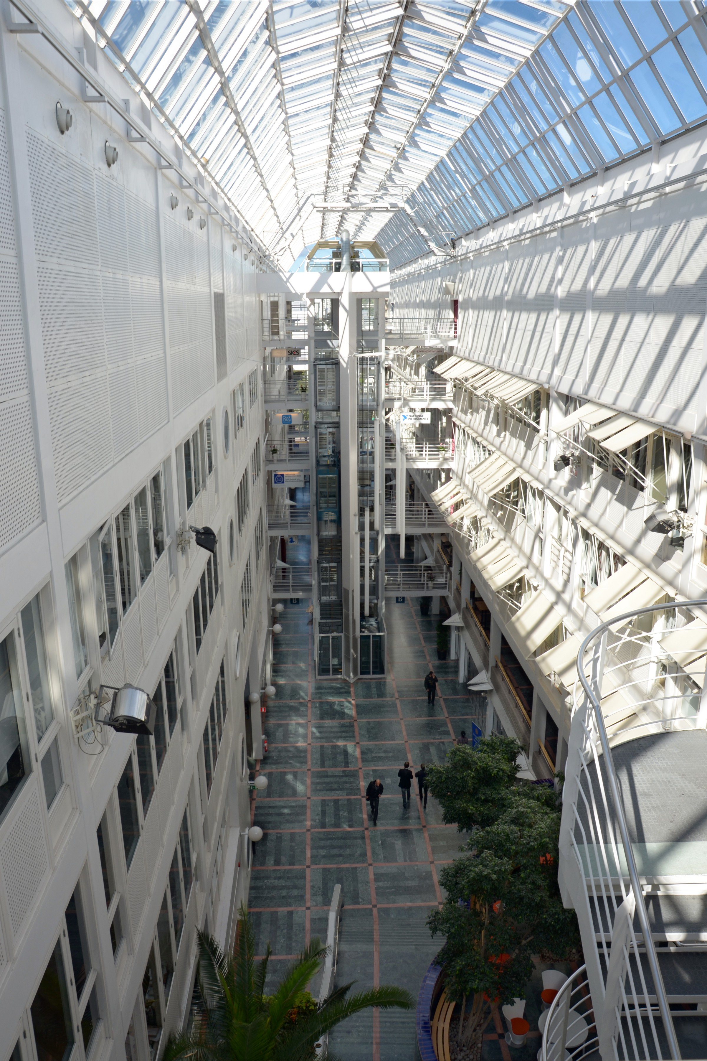 Elektrum. En av byggnaderna på Kungliga Tekniska högskolans campus i Kista.